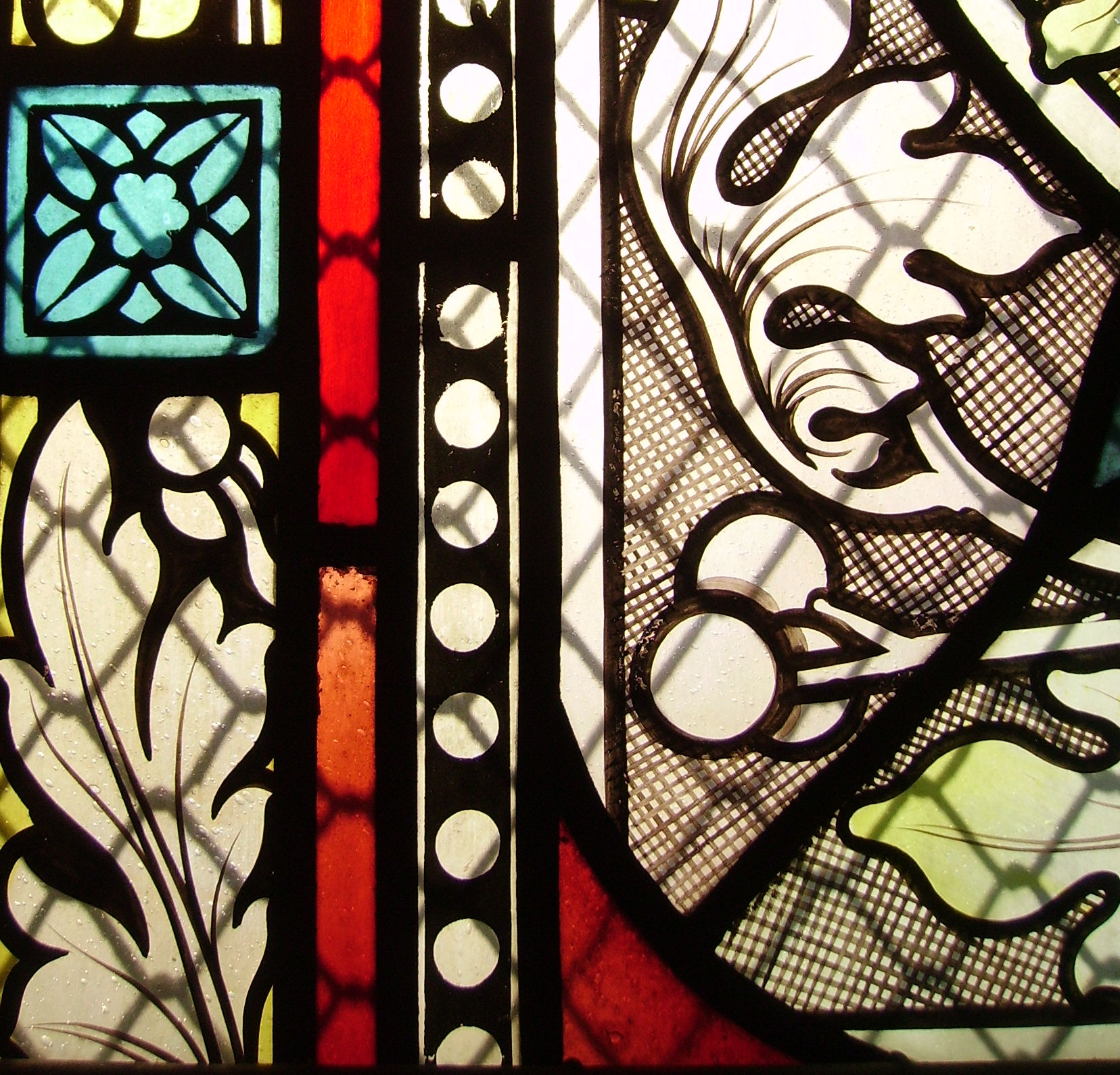 Gedächtniskirche (Memorial Church) in Speyer, Germany